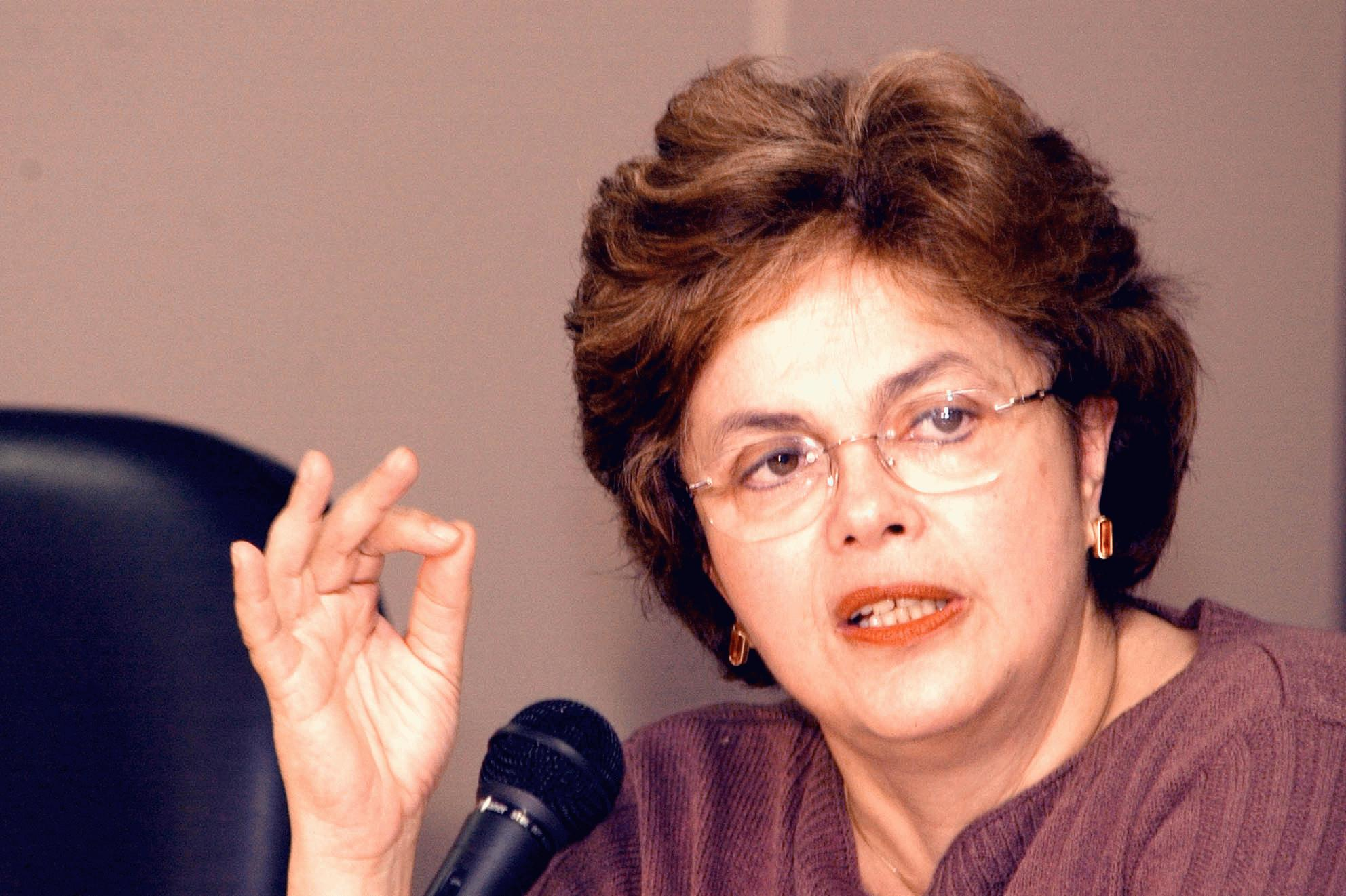 A ministra de Minas e Energia, Dilma Rousseff, em entrevista.